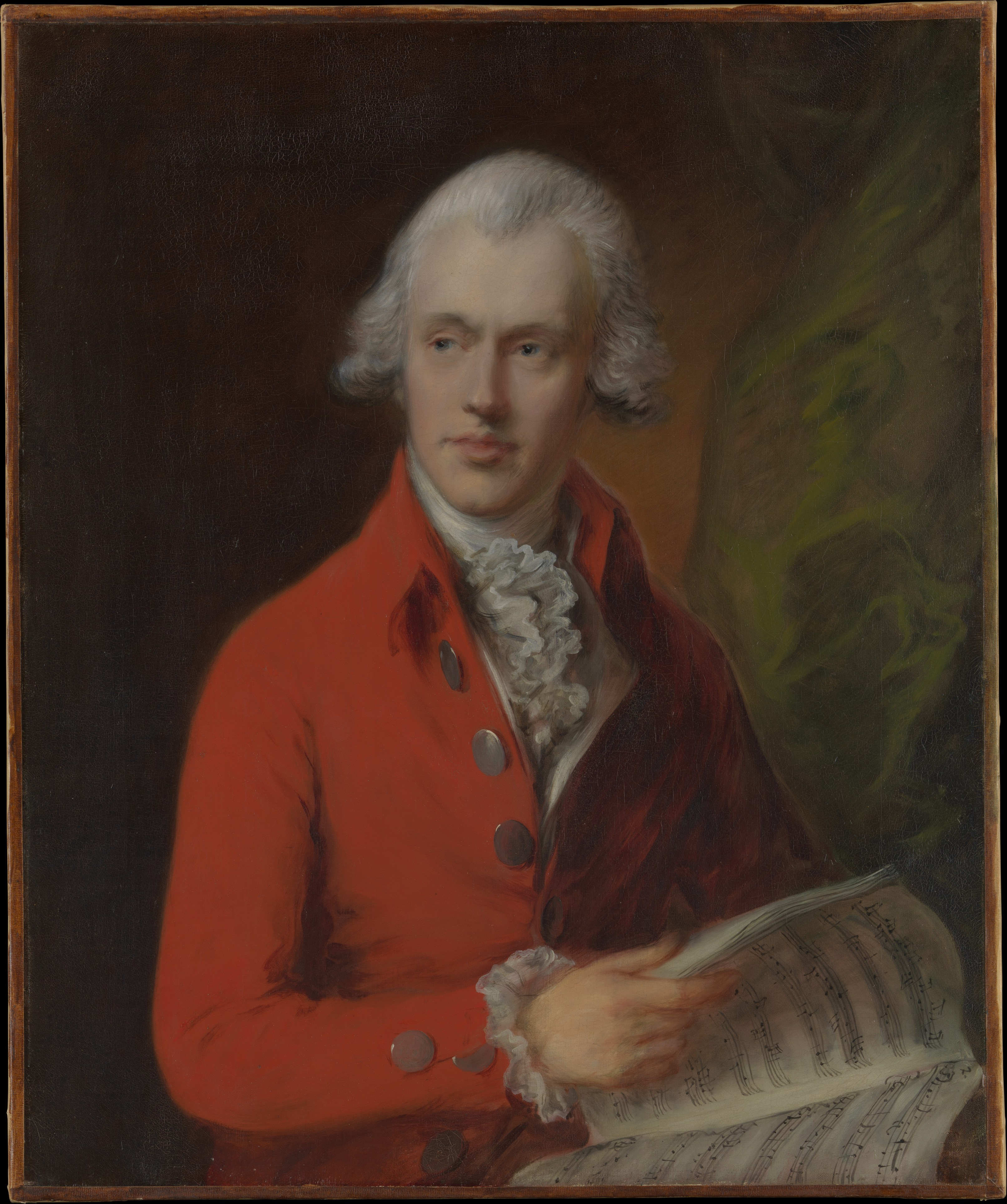 Portrait of Charles Rousseau Burney (1747–1819), late 1770s